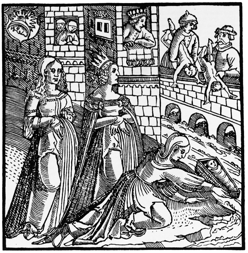 Францыск Скарына. Дачка фараона і Майсей. Кніга Выхад. Прага, каля 1519. Тытульны аркуш. 104Х105 мм.